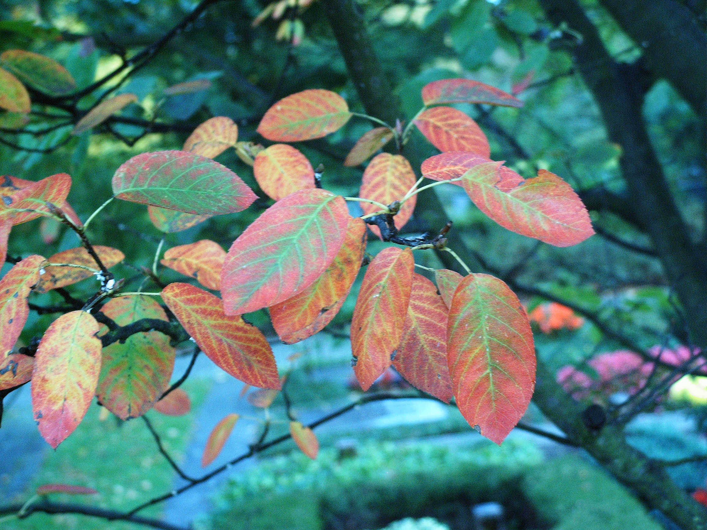 Herbst im Venner Moor nahe Münster (vermutlich Amelanchier lamarckii)